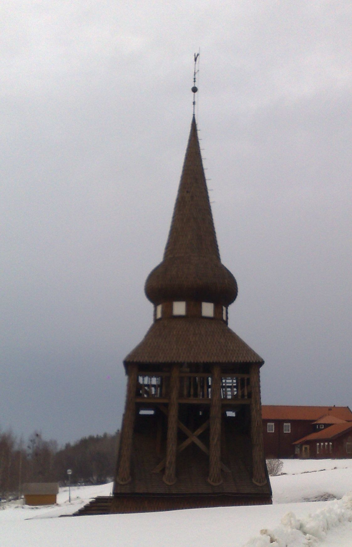 Hackås kyrktorn